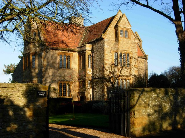 Gayton Manor